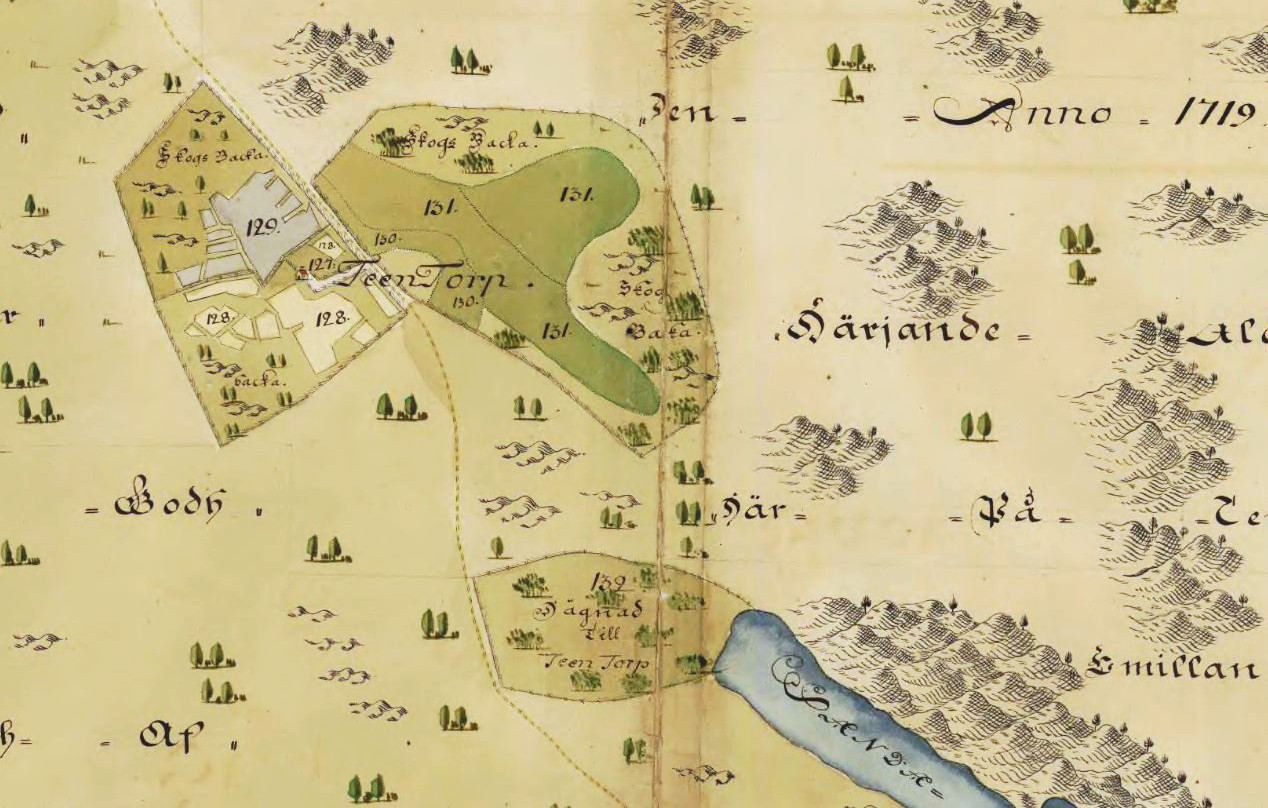 Del av Erstaviks ägor visande Tenntorp (Teen Torp)